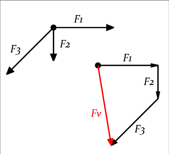 Skládání sil